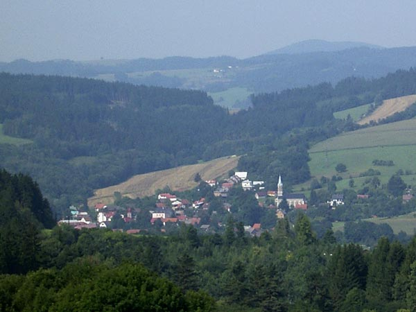 Pržno - pohled z Růžďky